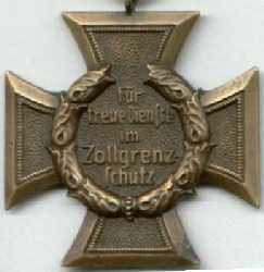 Rückseite Zollgrenzschutz-Ehrenzeichen